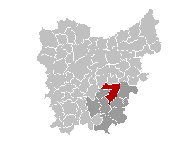 Lede ook in het rood gezet